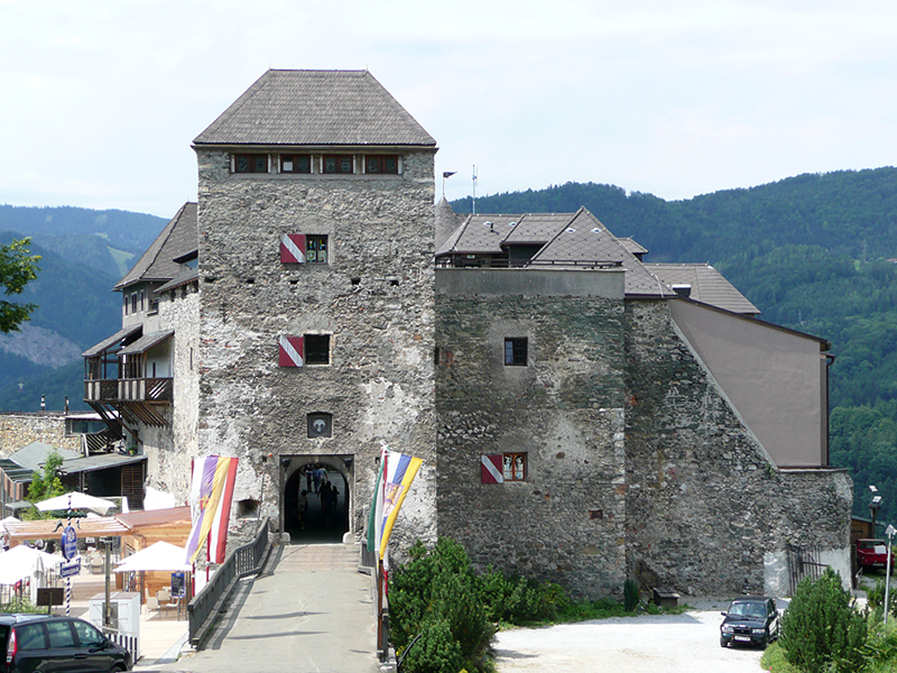 Burg Oberkapfenberg Frontansicht